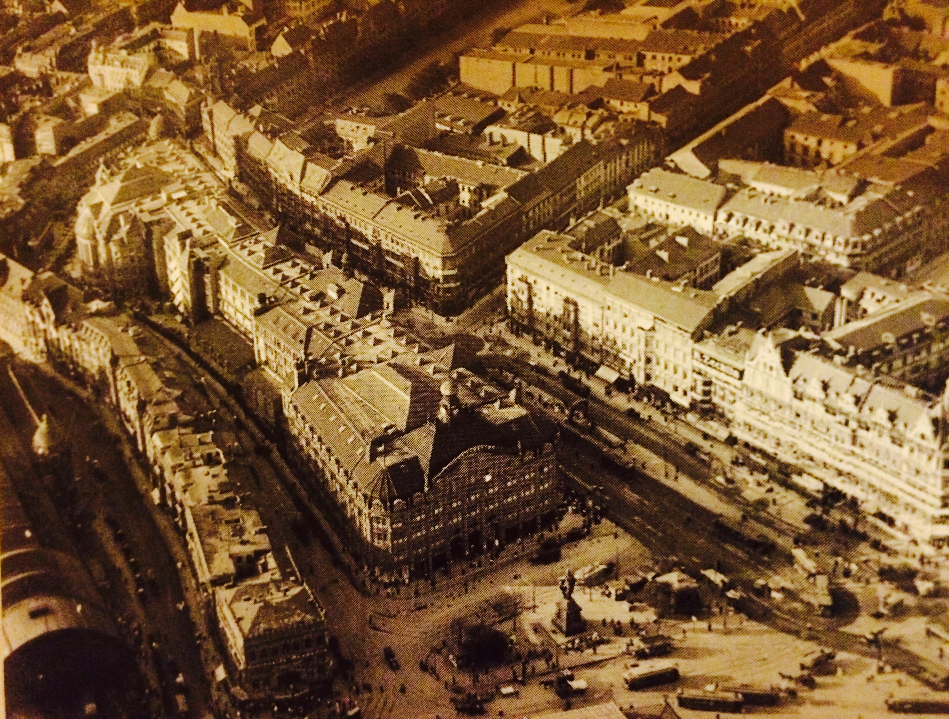 Alexanderplatz, Luftaufnahme 1912